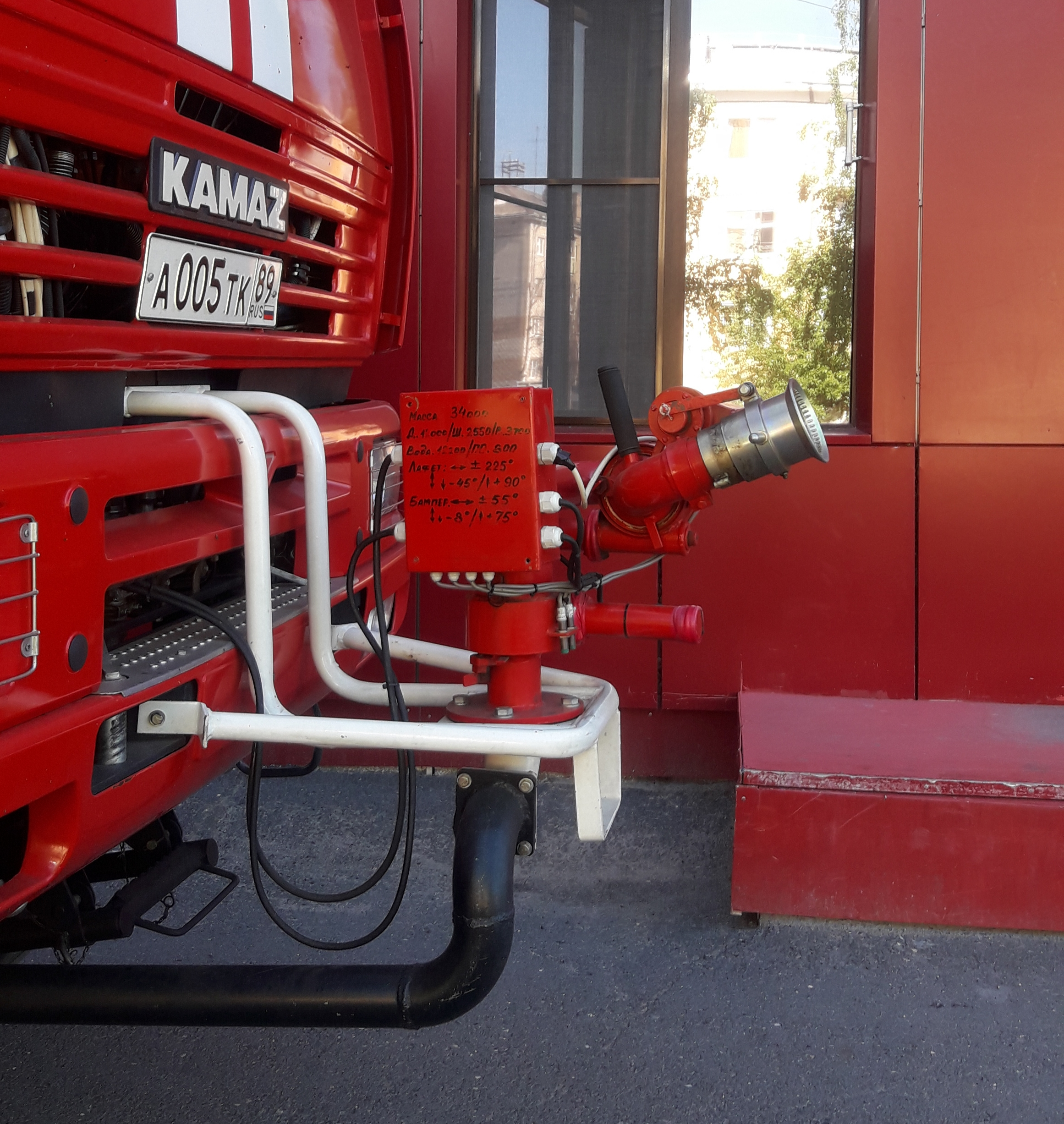 Пожарный аэродромный автомобиль АА-13/60